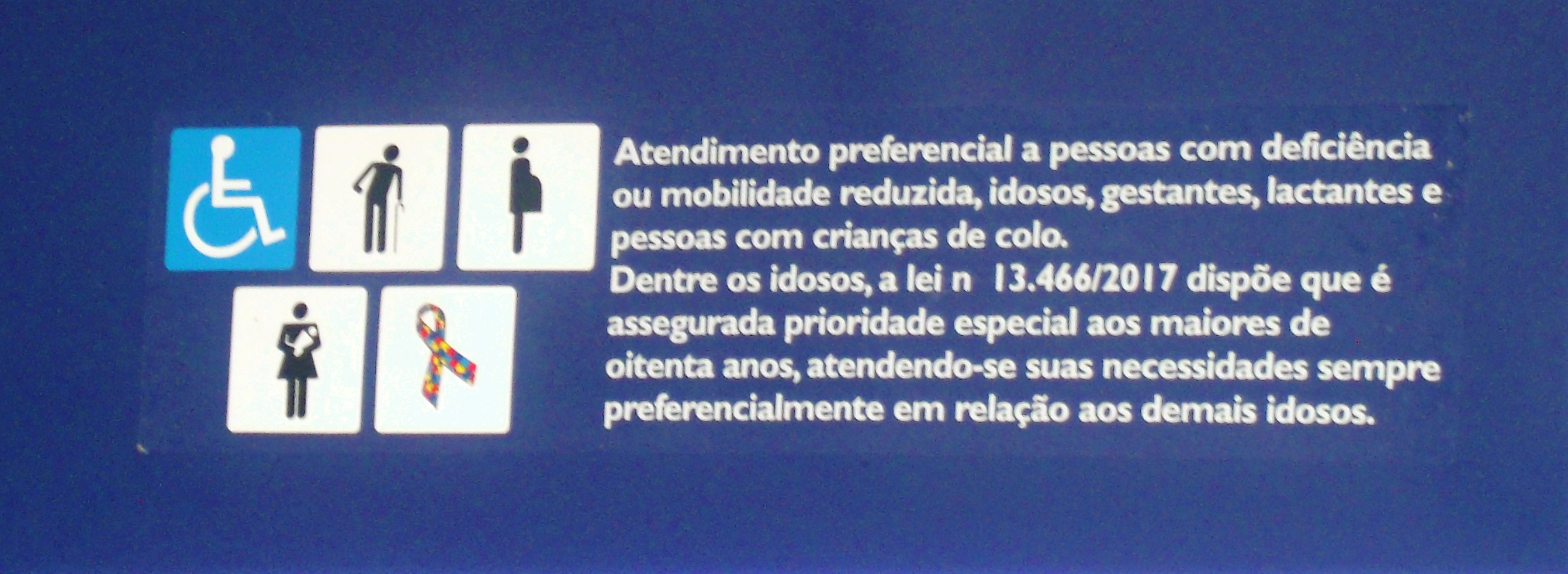 Material sobre a Lei Federal do Brasil que estabelece normas, no Estatuto do Idoso, para quem tem mais de 80 anos de idade.